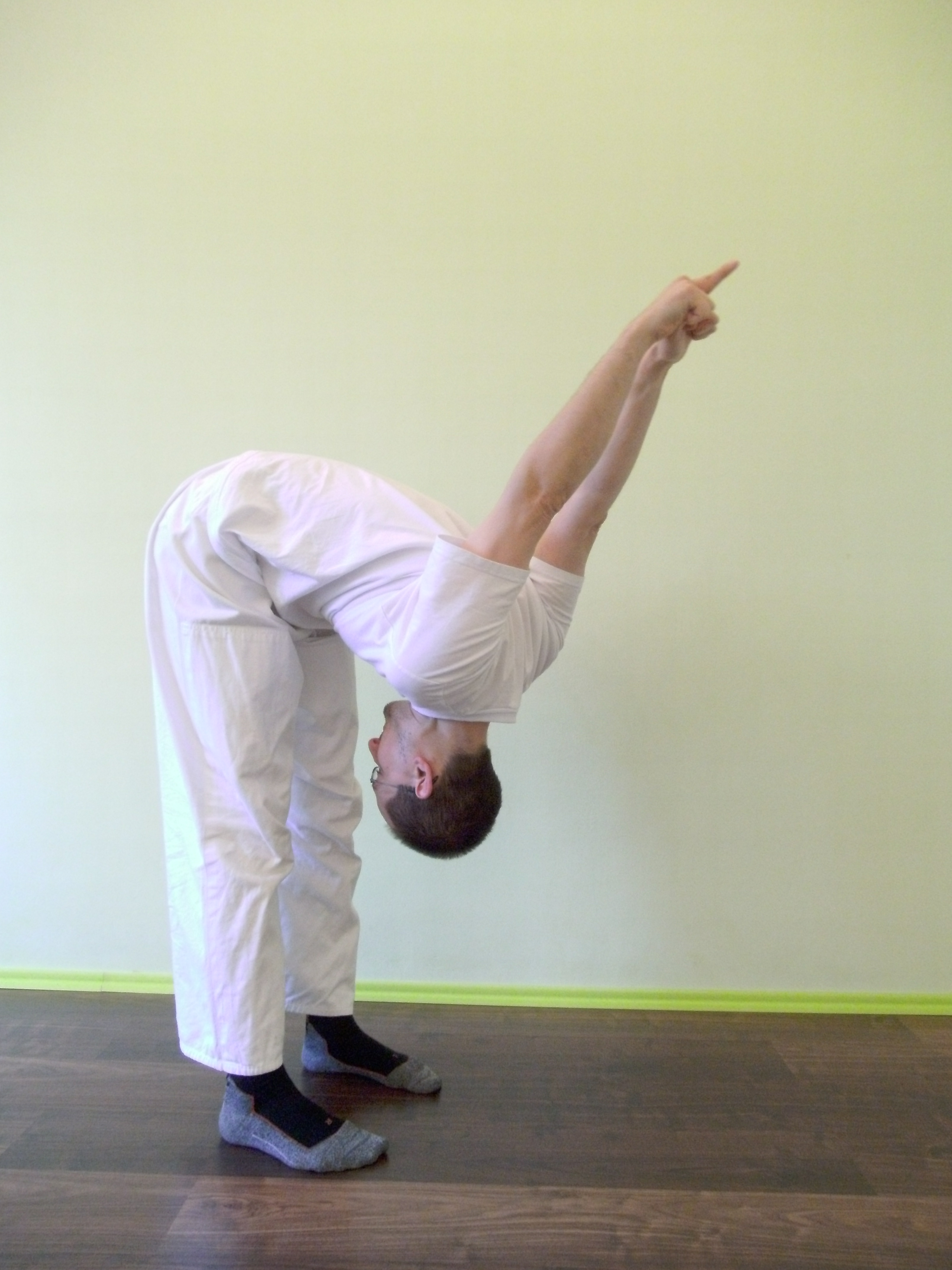 Makko Ho Übung für Lungen- und Dickdarmmeridian